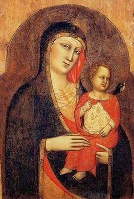 Museo dell'opera del duomo, prato, Madonna col Bambino (1365 circa)